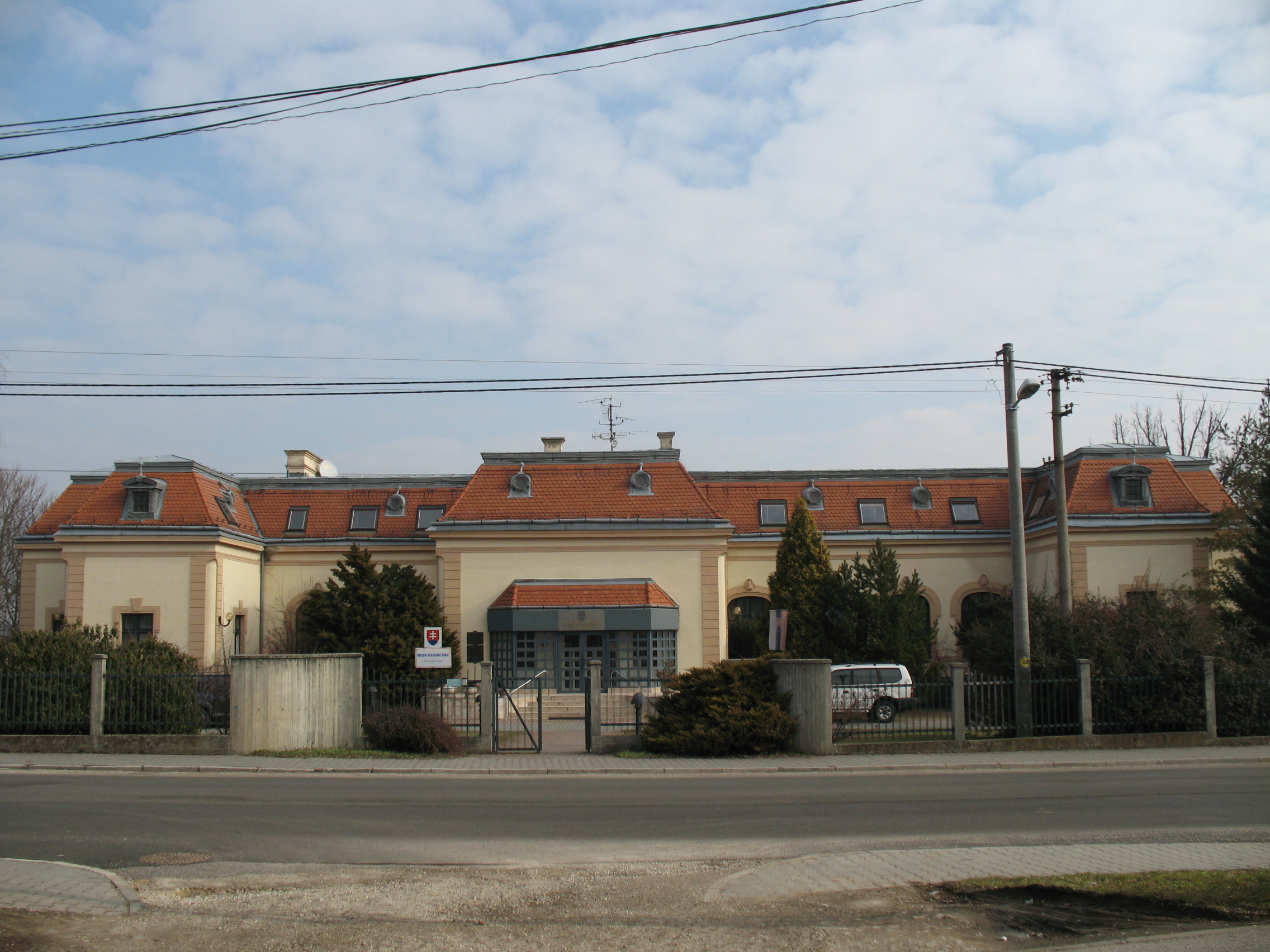 Nyitraivánka levéltár